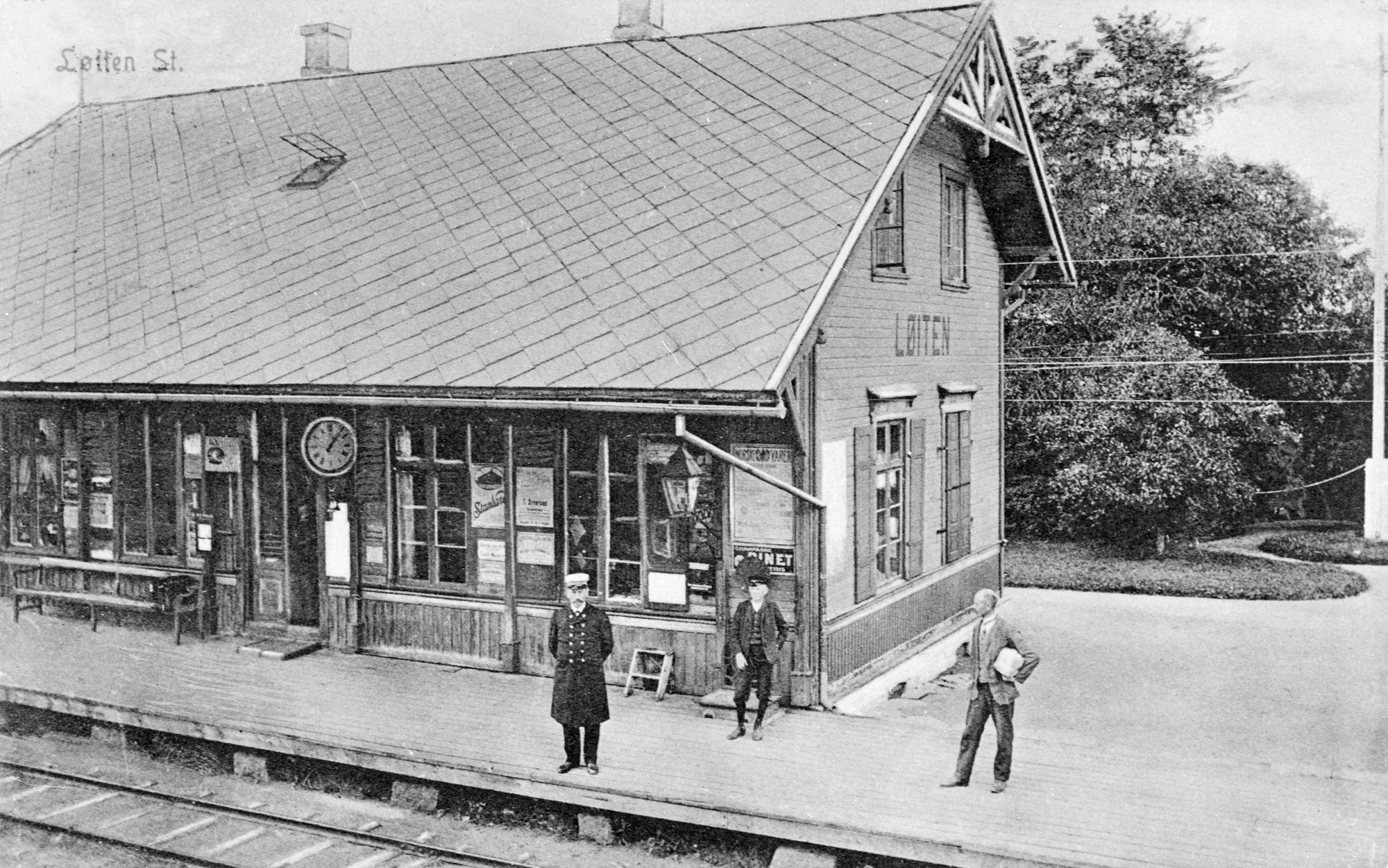 Løten stasjon i 1912. Tekst i Digitalt museum: «POSTKORT. EKSTR: LØTEN STASJON, STASJONSBETJENT, 2 MENN, Se Lautin 1977 side 143. » Fotograf iflg. Digitalt museum: Larsen-Normann. Fra Domkirkeoddens fotoarkiv. Inventarnummer: 0415-00210.